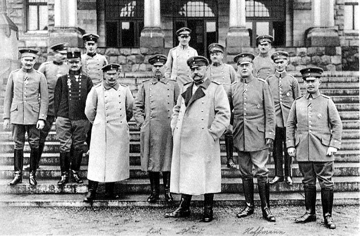 Hindenburg in seinem Hauptquartier vor der Treppe des Posener Schlosses. Die Personen von links nach rechts: Rittmeister de la Croix, Major von Baehr, Hauptmann Moritz Fleifchmann von Theissruck (östereichischer Verbindungsoffizier) , Leutnant von Bismarck, Hauptmann Caemmerer, Ludendorff, Oberleutnant d. R. Markau, Hindenburg, Hauptmann Frantz, Max Hoffmann, Oberleutnant Steinide ,Hauptmann von Walbow, Hauptmann von Bollrad-Bodelberg.